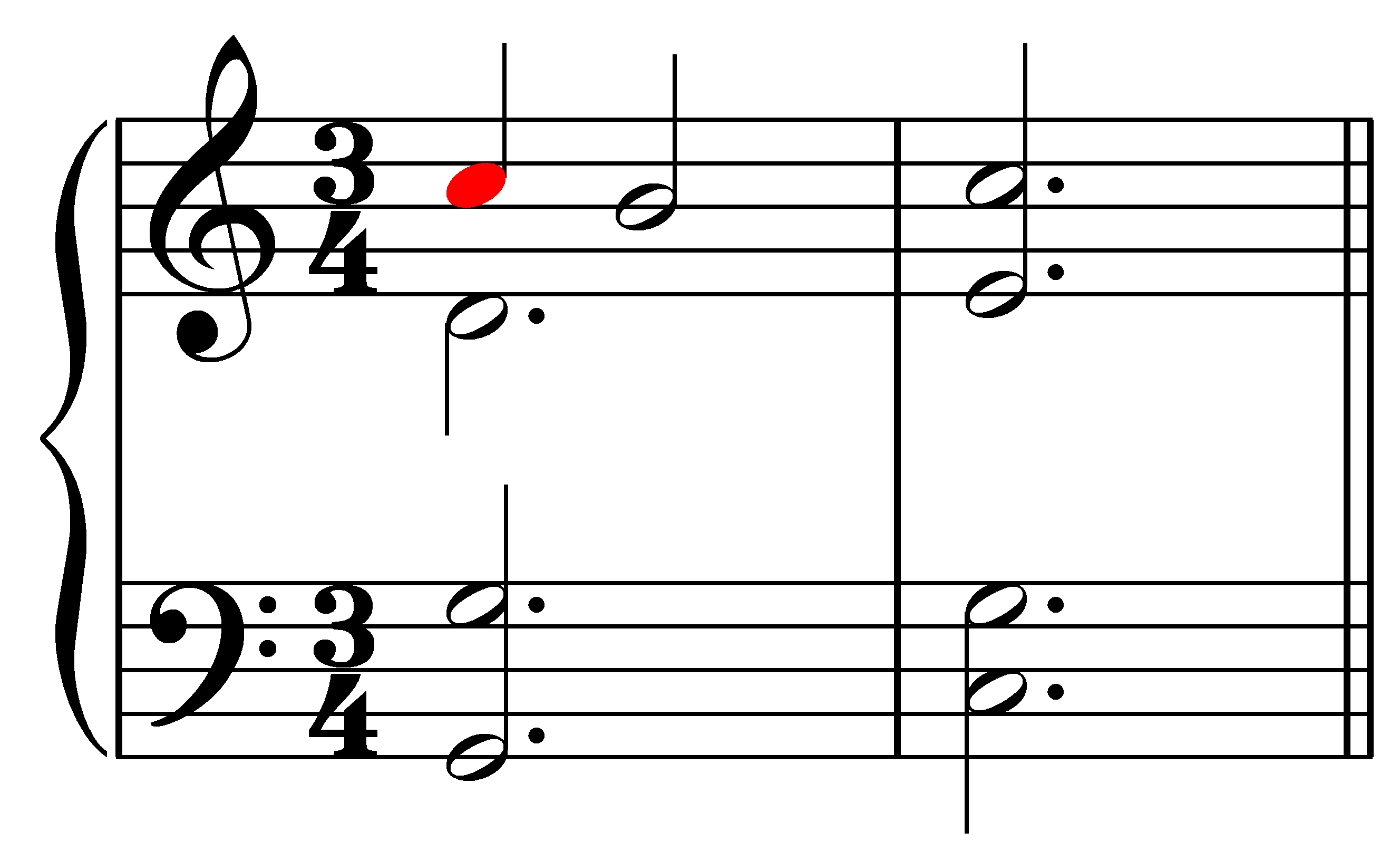 نت آپاژیاتور